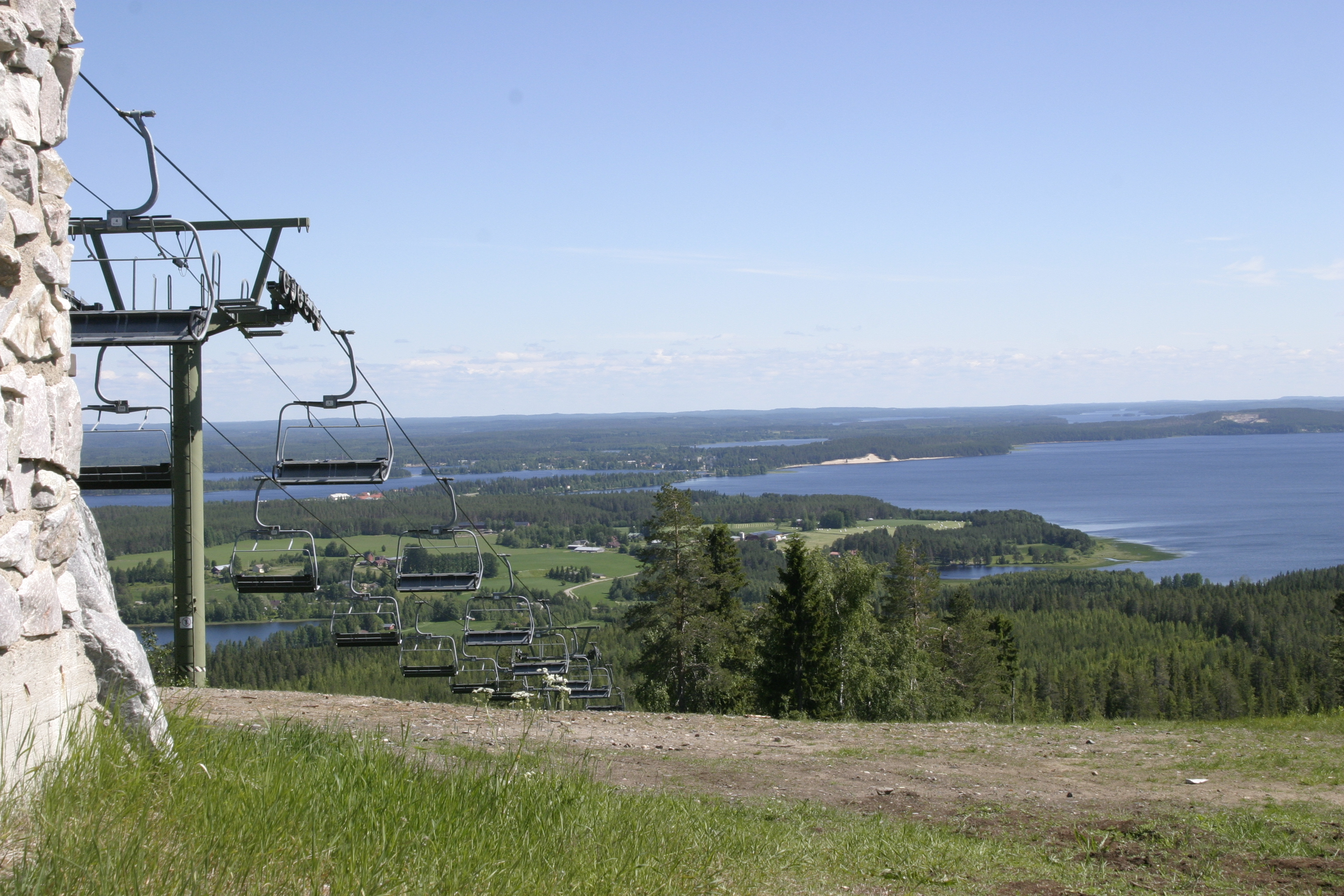 Sapsojärvi kuvattuna Vuokatinvaaralta kuvattuna